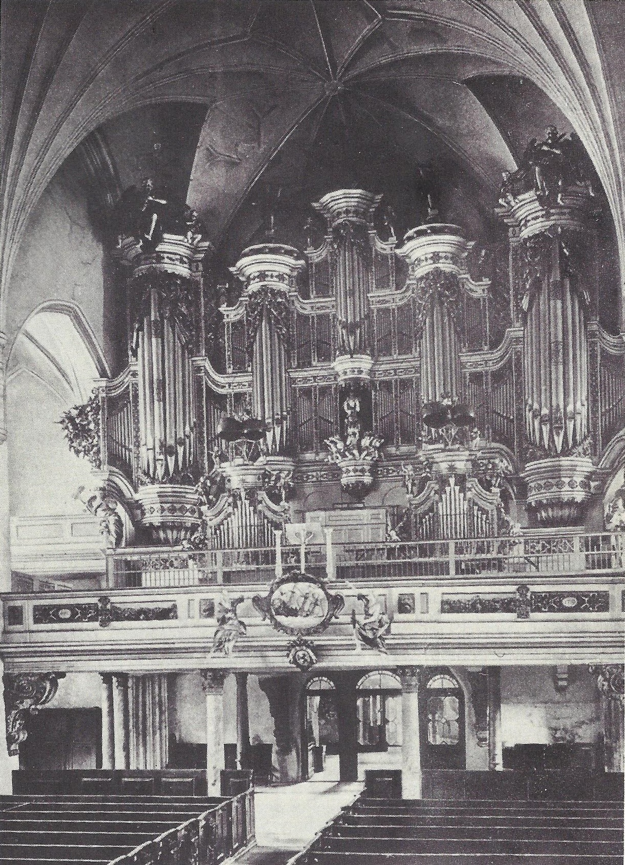 Alte Orgel im Königsberger Dom (vor 1945)